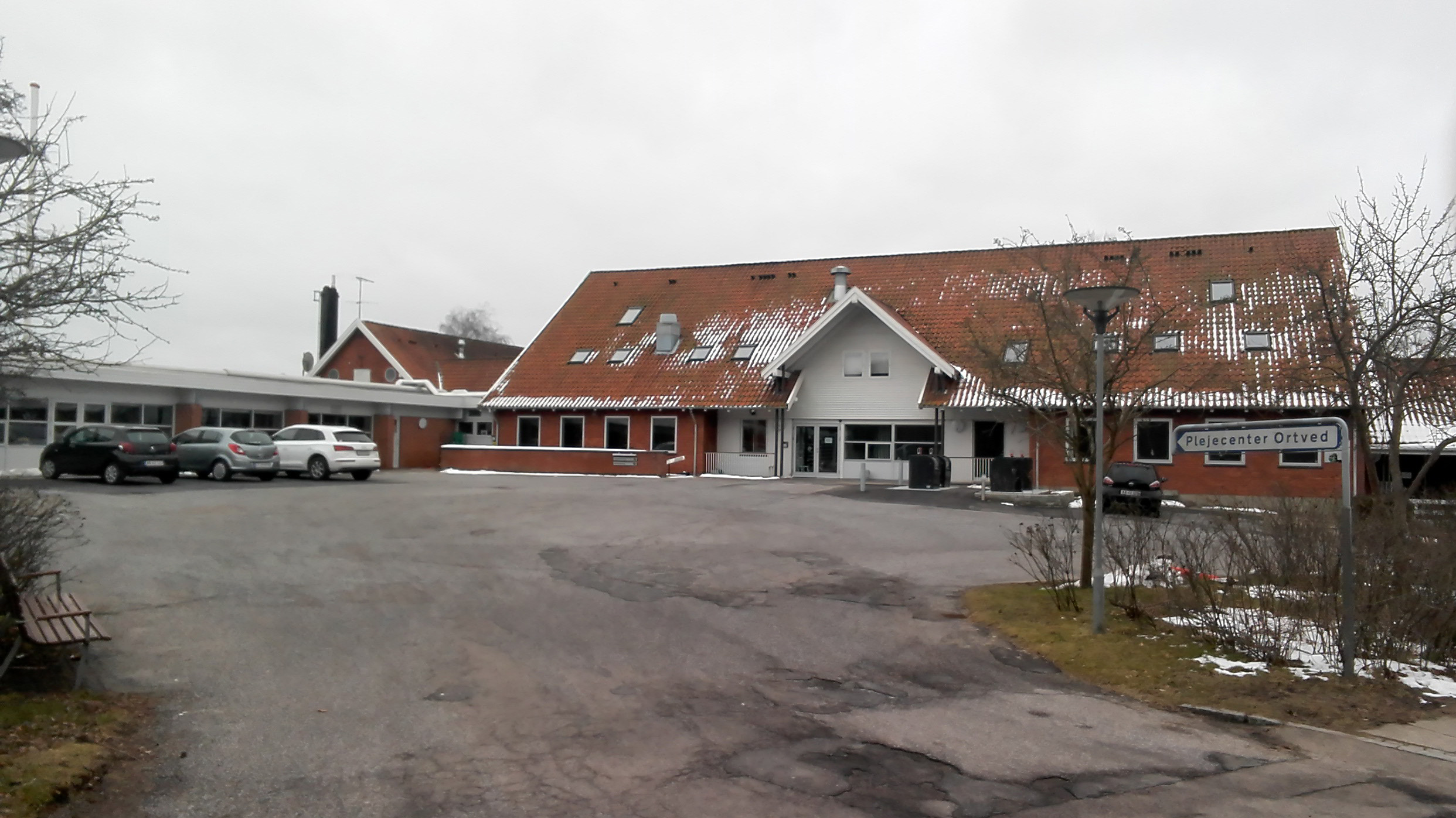 Plejecenter Ortved